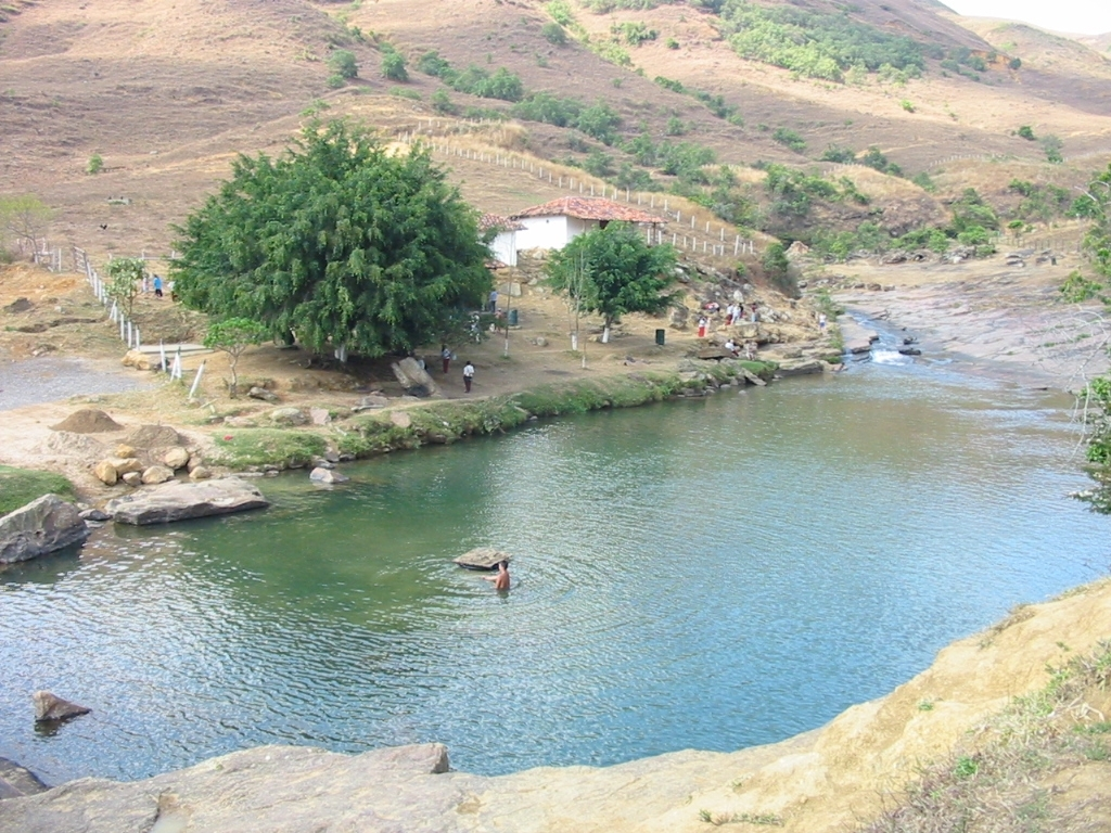 Vista panaramica del pozo la batea, en el balnaerio natural pescaderito municipio de santander, atractivo turistico